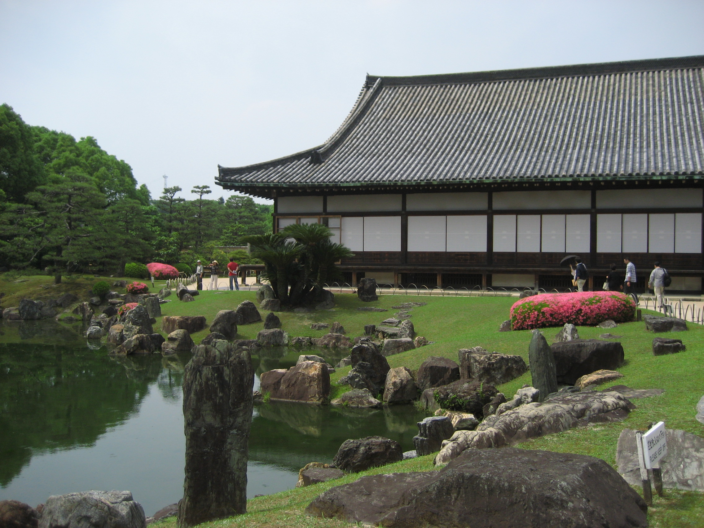 Nijojocho, Nakagyo Ward, Kyoto, Kyoto Prefecture 604-8301, Japan